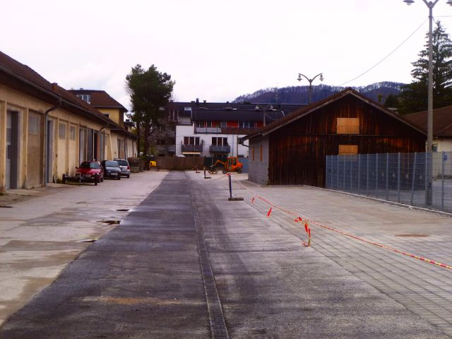 Buchholzerhof (???)